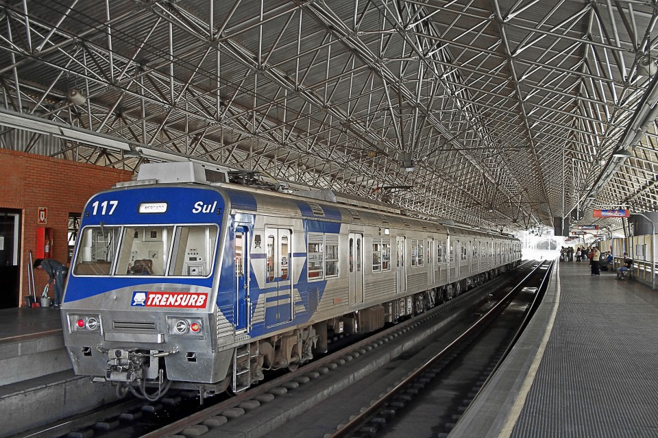 Trem recebendo passageiros na Estação São Leopoldo do Metrô de Porto Alegre.